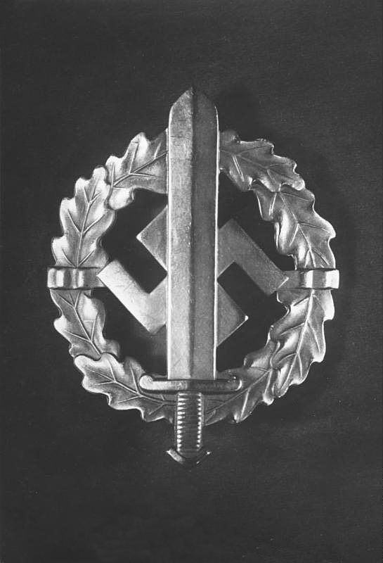 SA-Wehrabzeichen SA-Sportabzeichen wird SA-Wehrabzeichen Nach einem erlass des Führers vom 19. Januar wurde das SA-Sportabzeichen zum SA-Wehrabzeichen und damit zur Grundlage der vor-und nachmilitärischen Wehrerziehung erhoben. 22.1.39 [Herausgabedatum] AV 53649